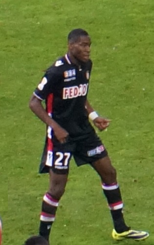 Joueur de foot en pleine action.